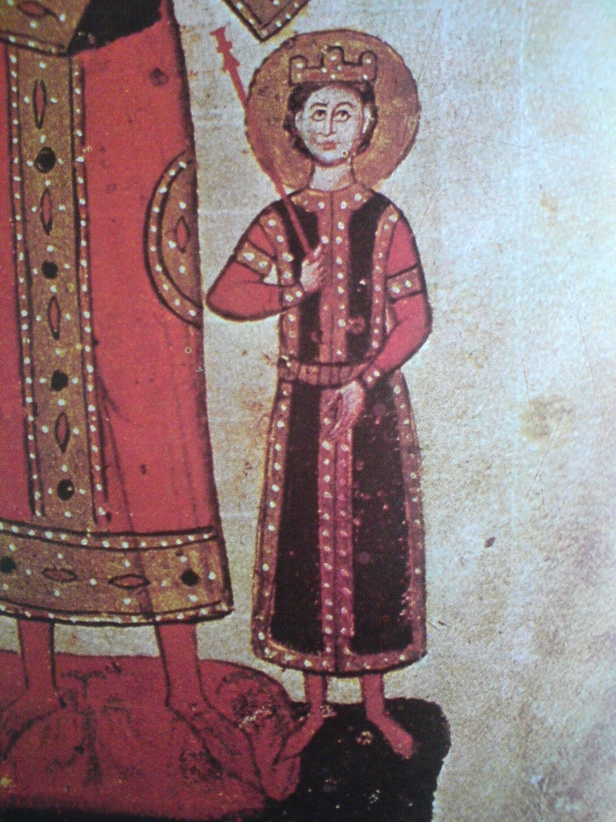 Иван Асен V, син н цар Иван Александър. Миниатюра от Лондонското евангелие на цар Иван Александър